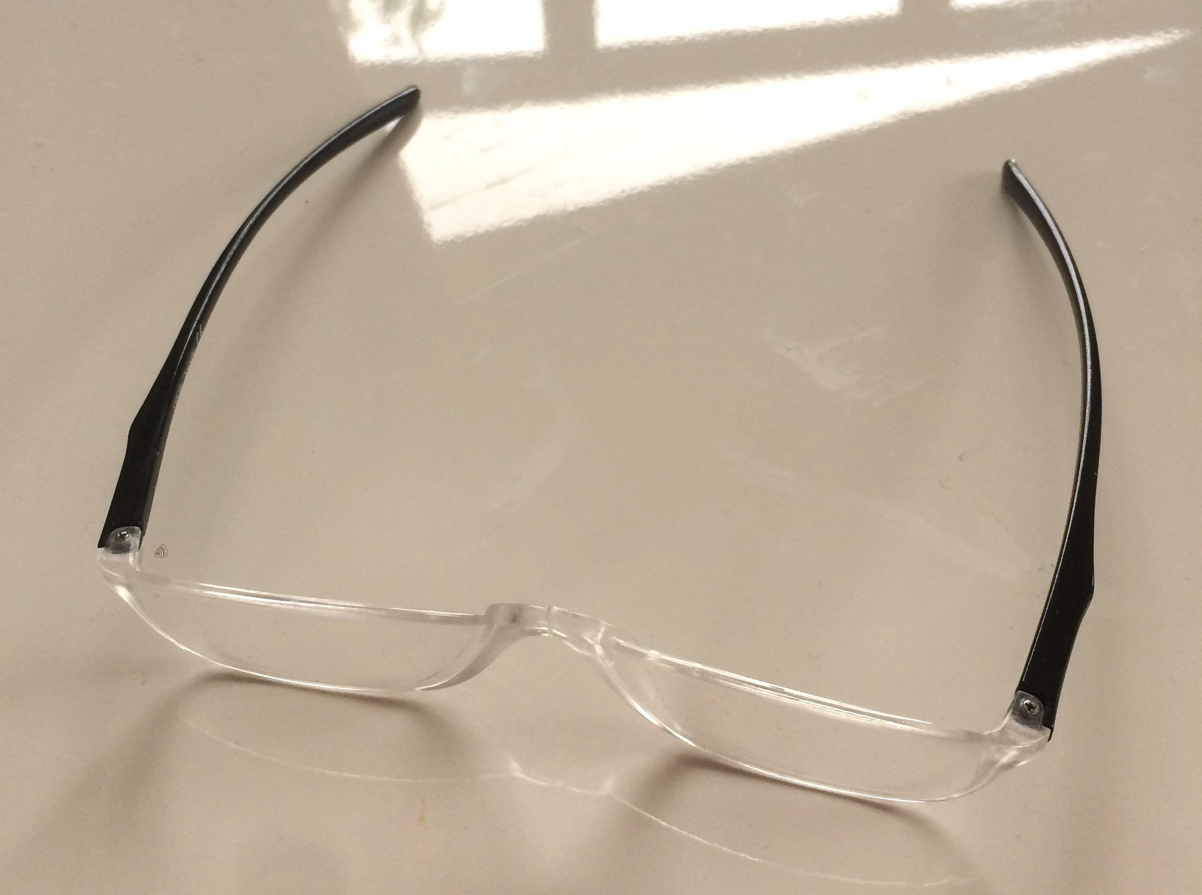 Lesebrille